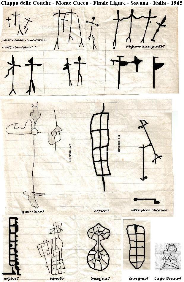 Orco-Feglino - Savona - Italia - 1965 - Ciappo delle conche paints